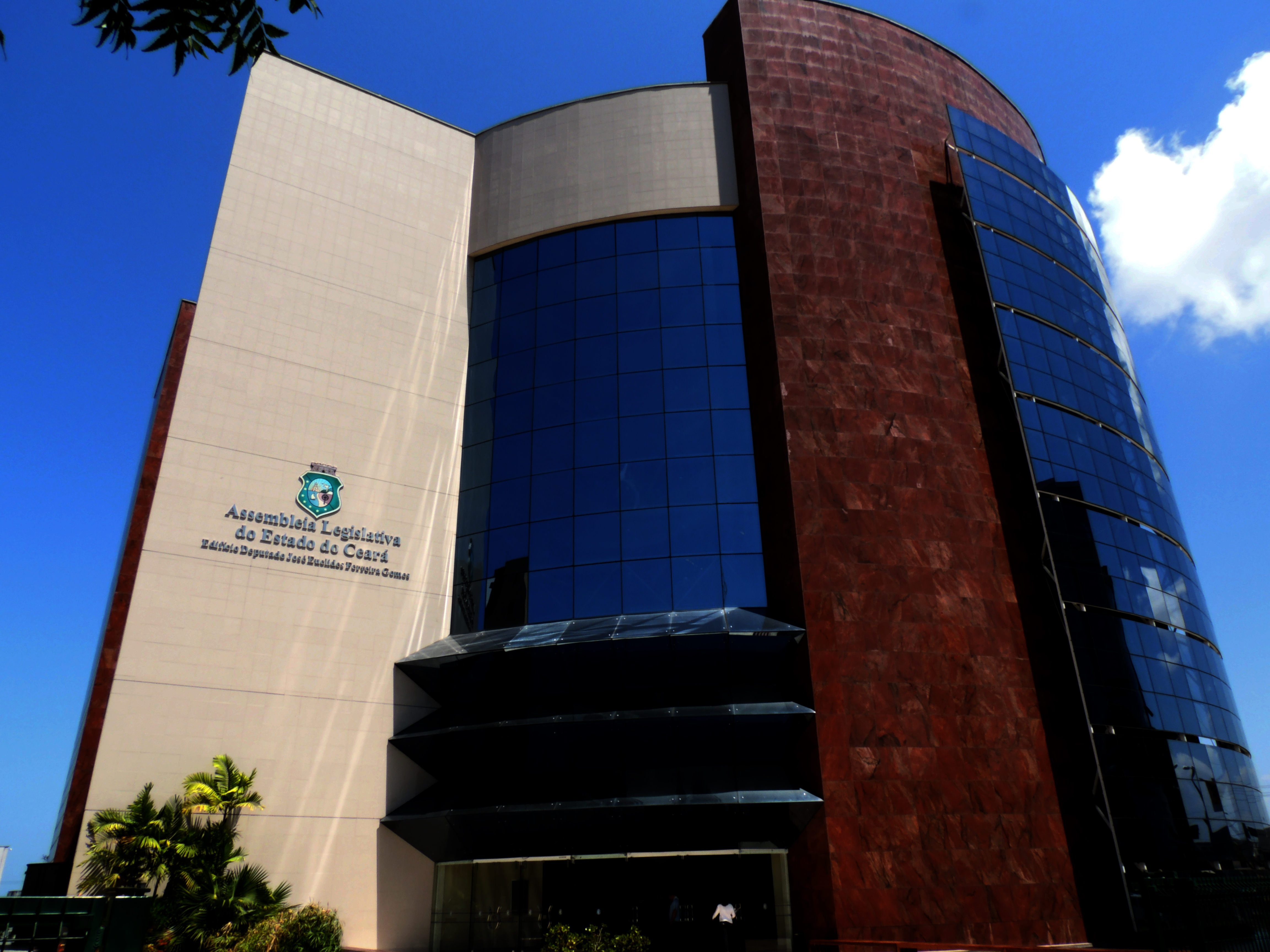 Antigo edifício da Assembléia Provincial, atual sede da Assembléia Legislativa Estadual, Edifício Deputado José Euclides Ferreira Gomes.